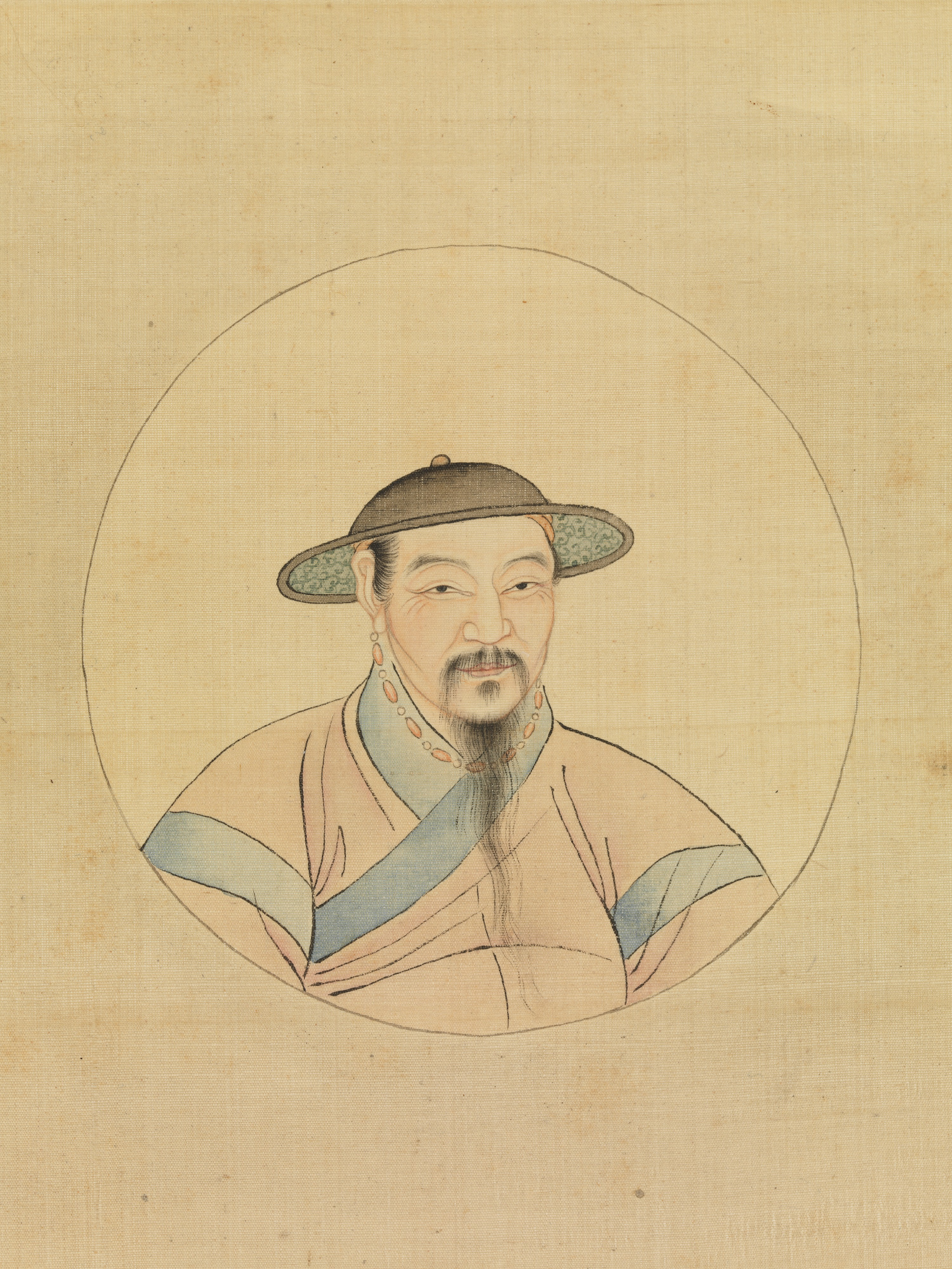 China; Hanging scroll; Paintings